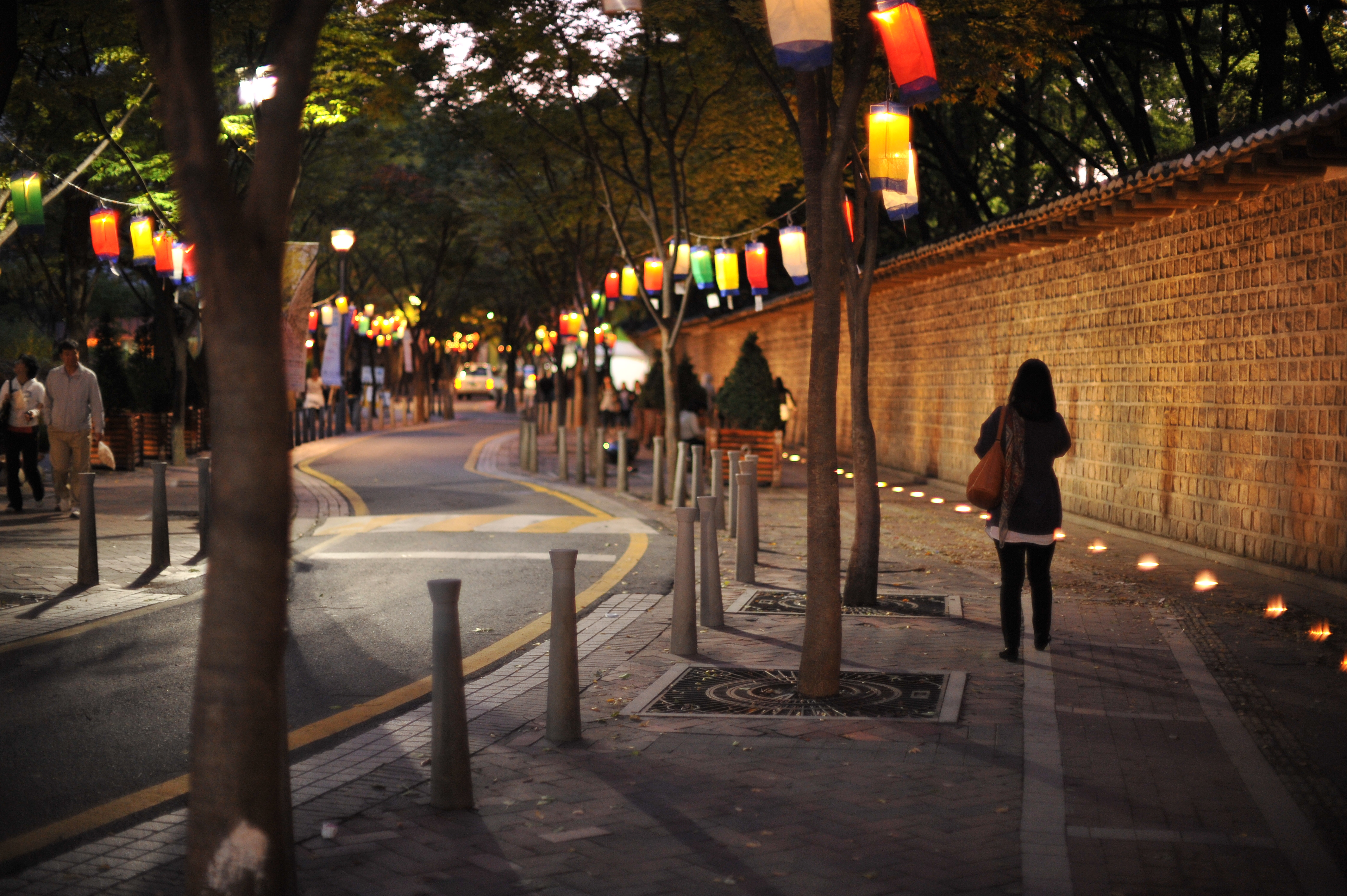 2009년 가을밤의 덕수궁 돌담길